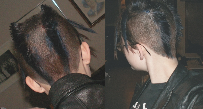 Bihawk